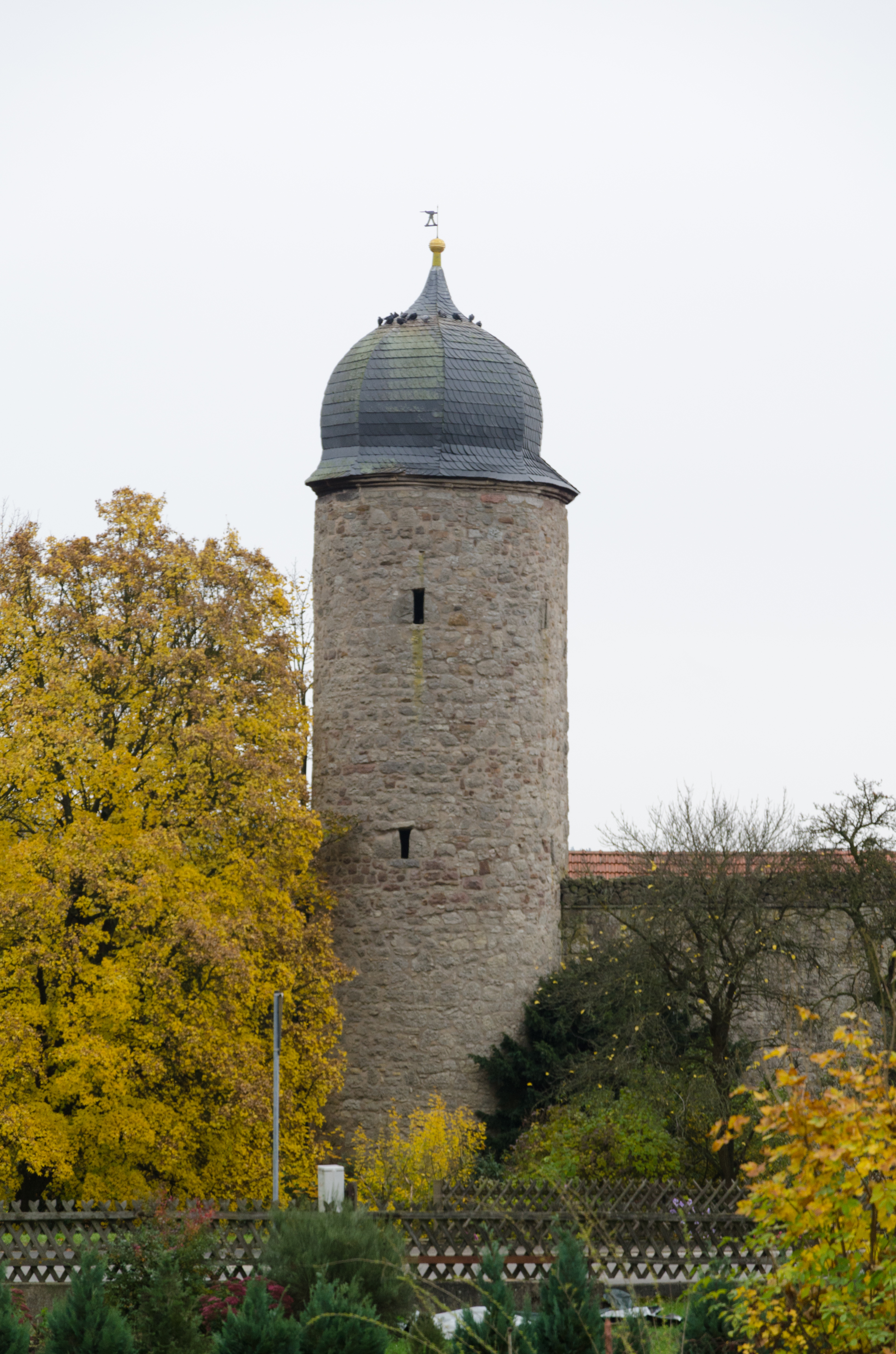 Stadtmauer Flandungen